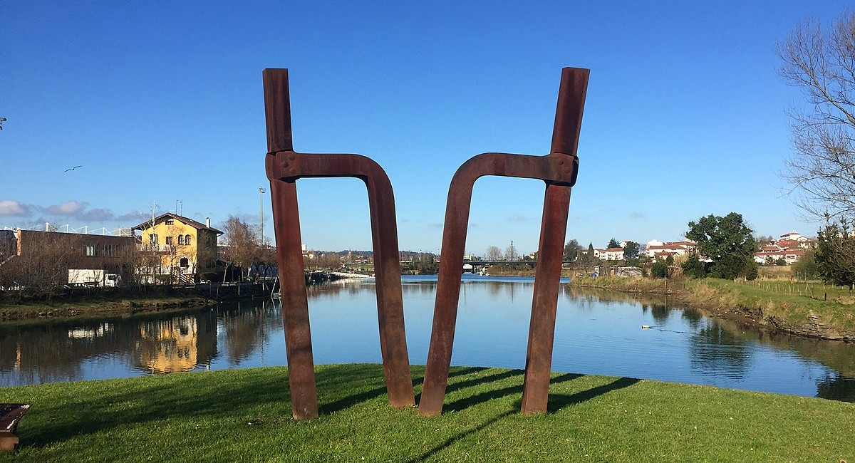 Irungo Eskultura Bidasoa ibaian